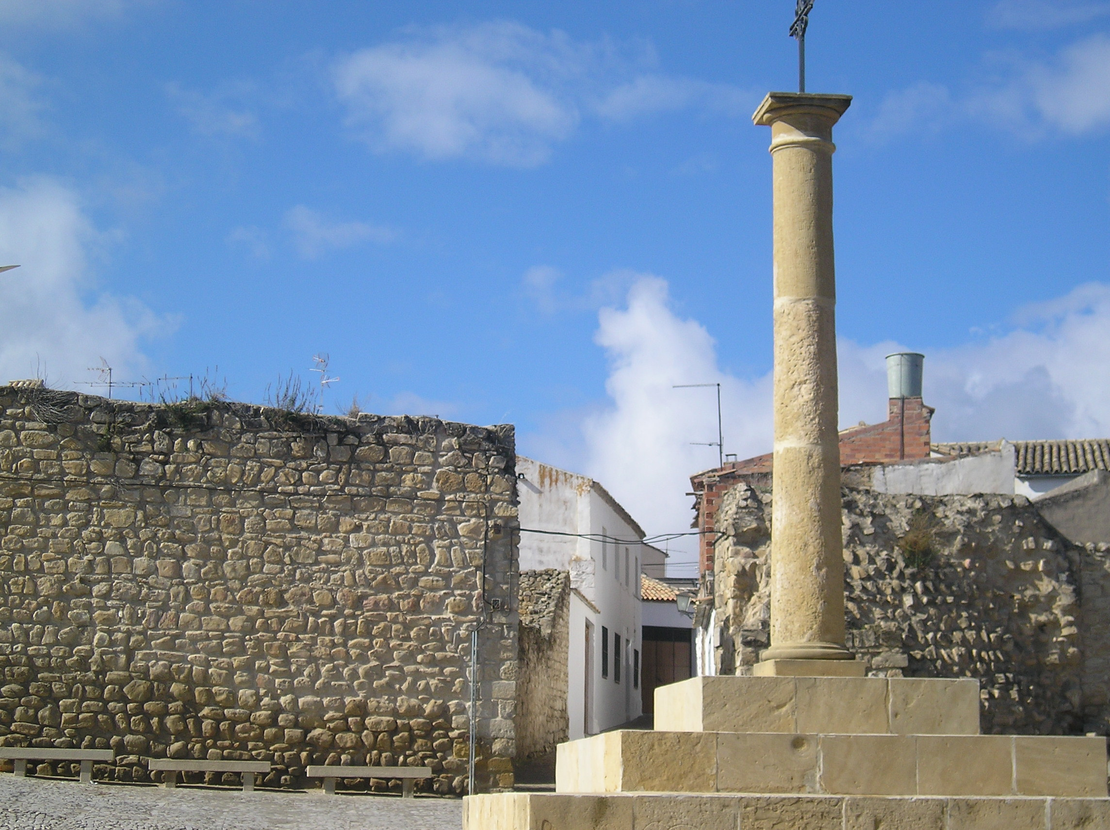 Detalle de las Murallas de Sabiote.